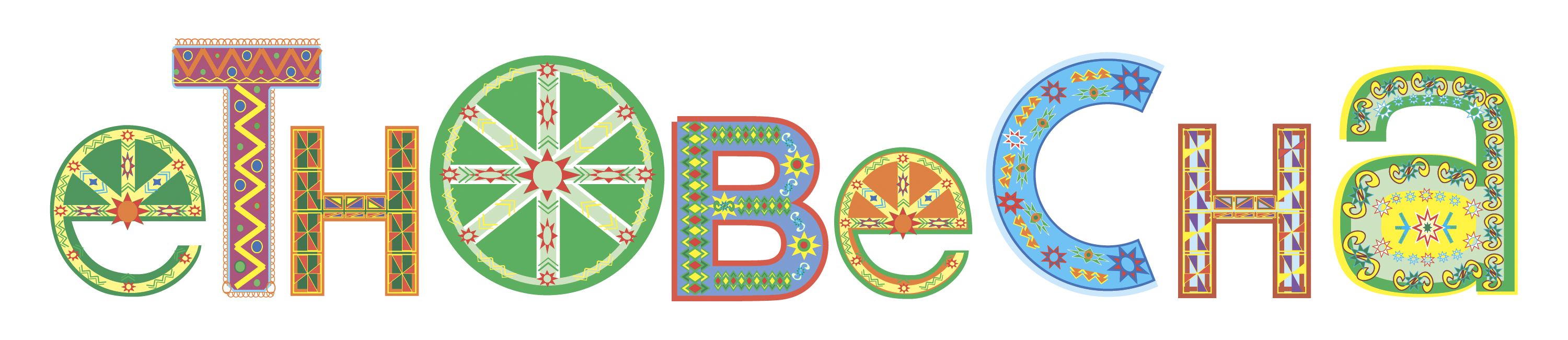 ЕтноВесна - Логотип